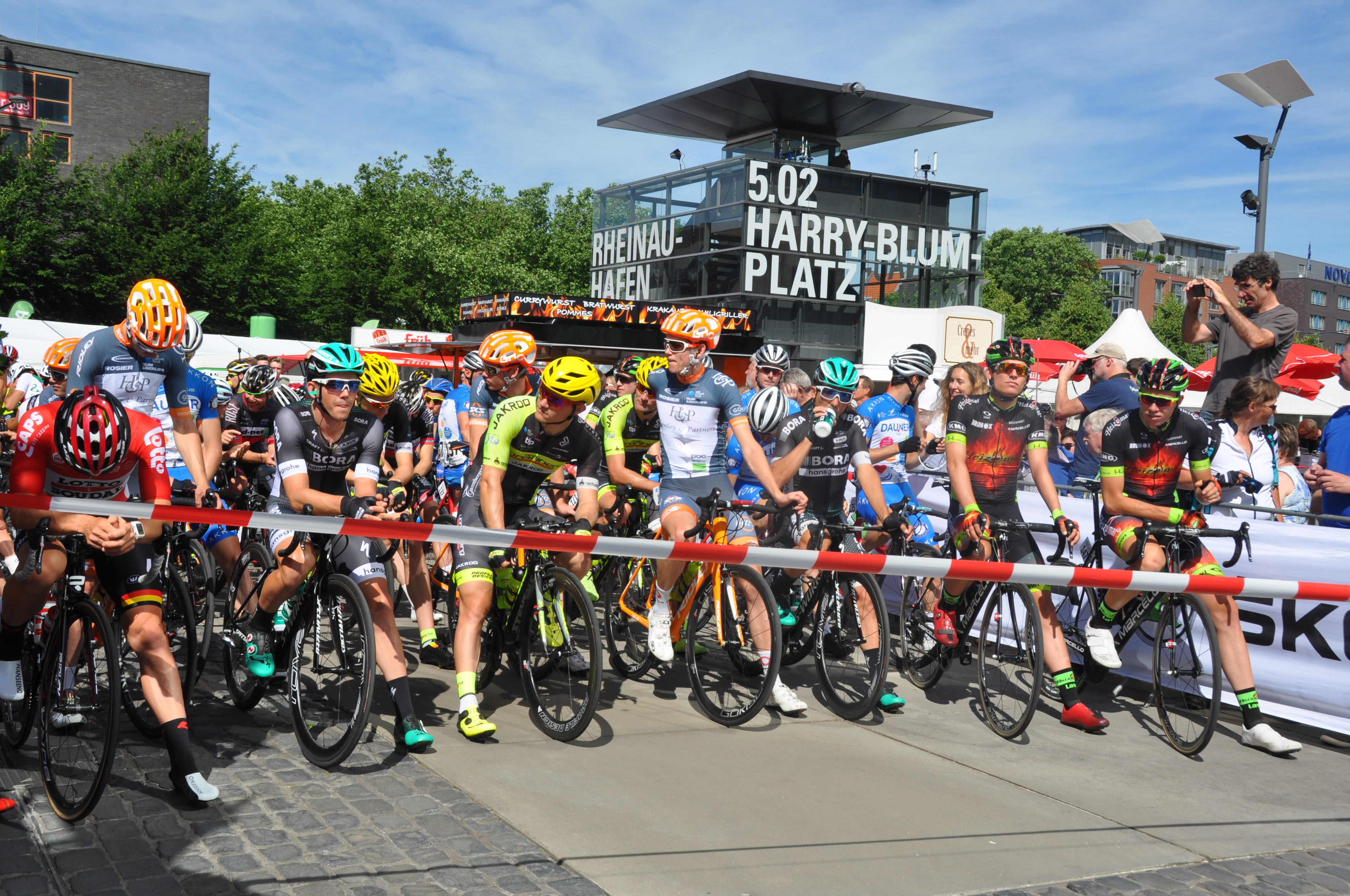 Vor dem Start zum Profirennen